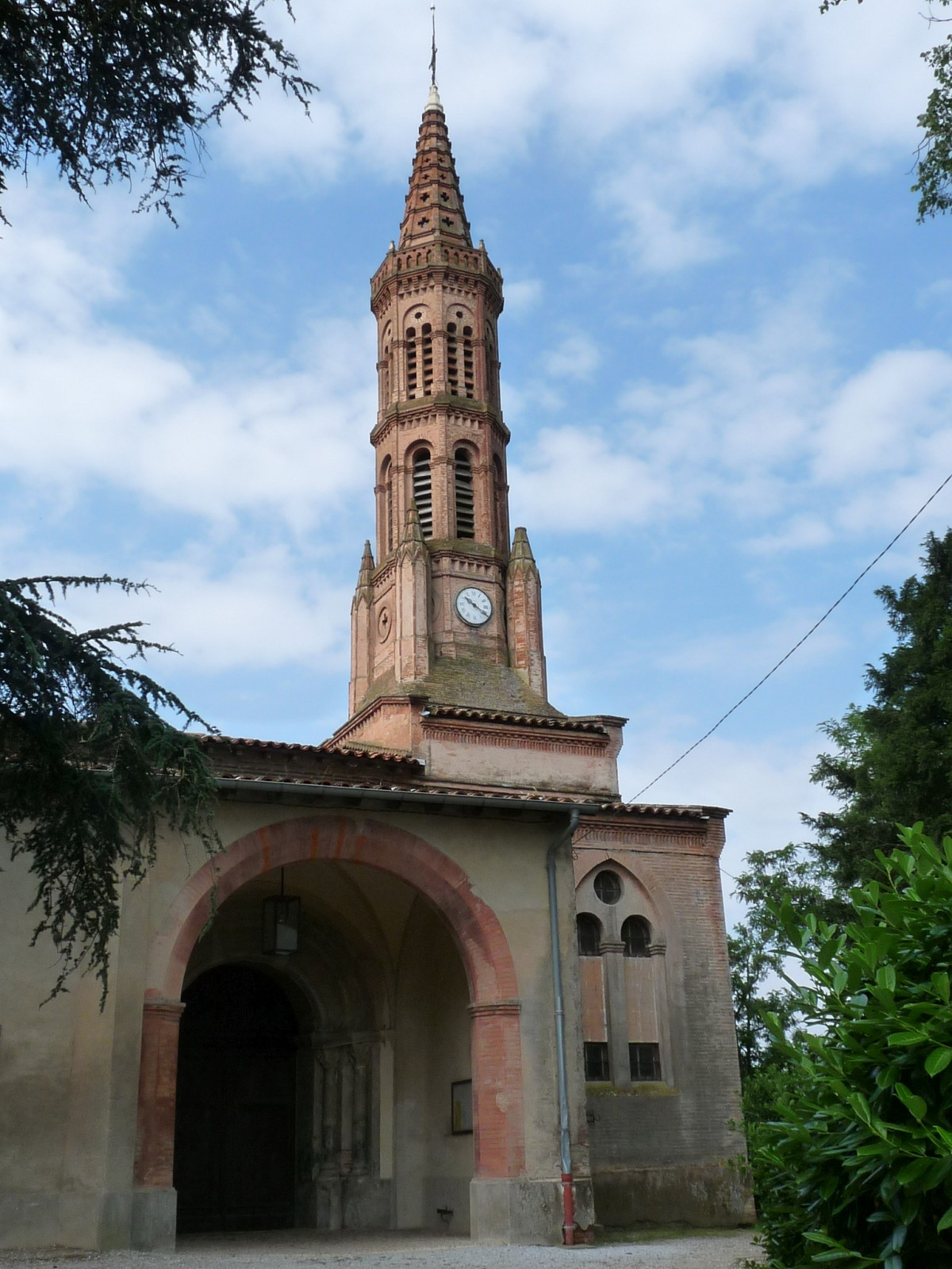 Eglise de Belberaud, Haute-Garonne, France